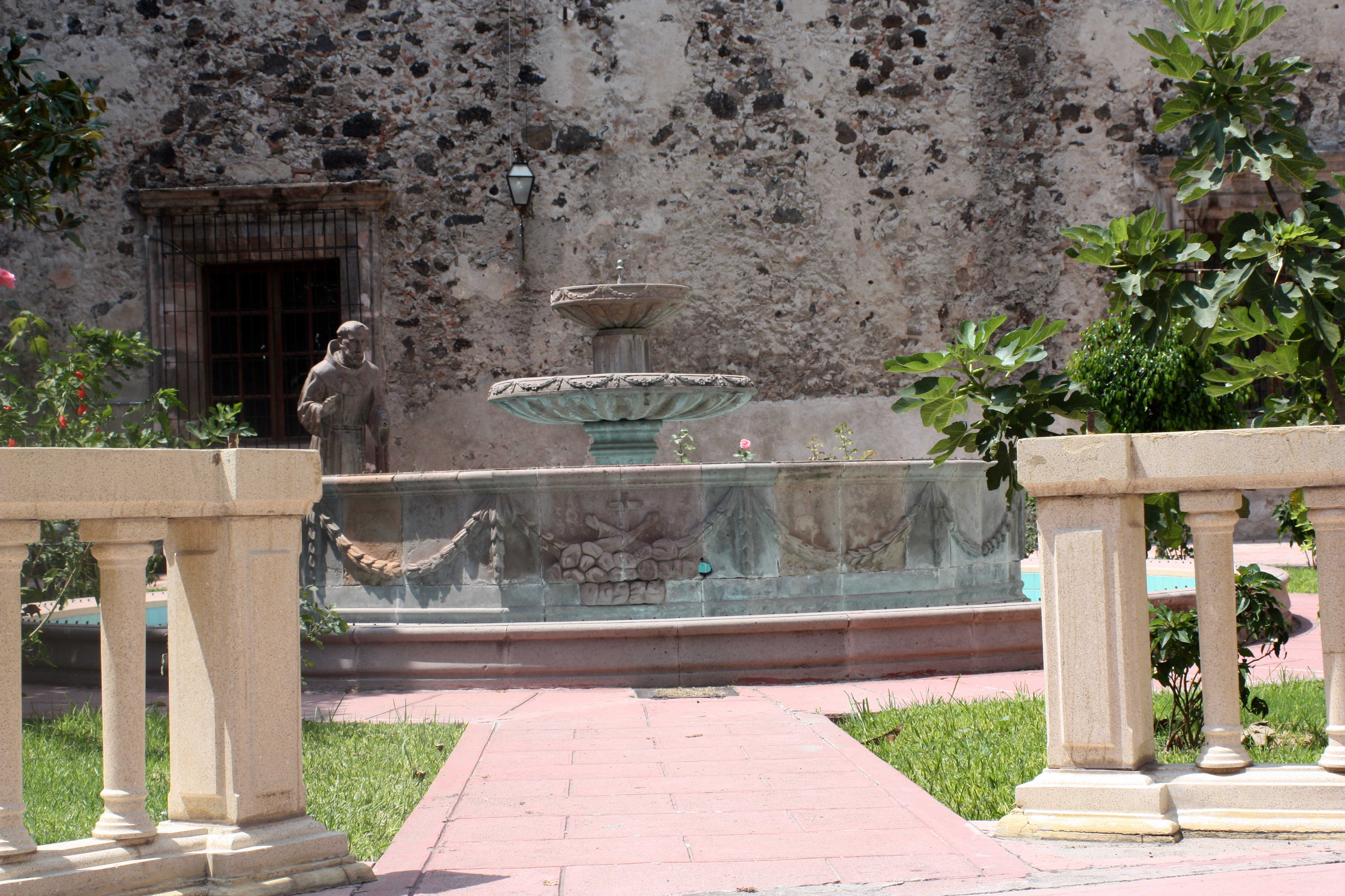 de los espacios más bellos y menos visitados del convento